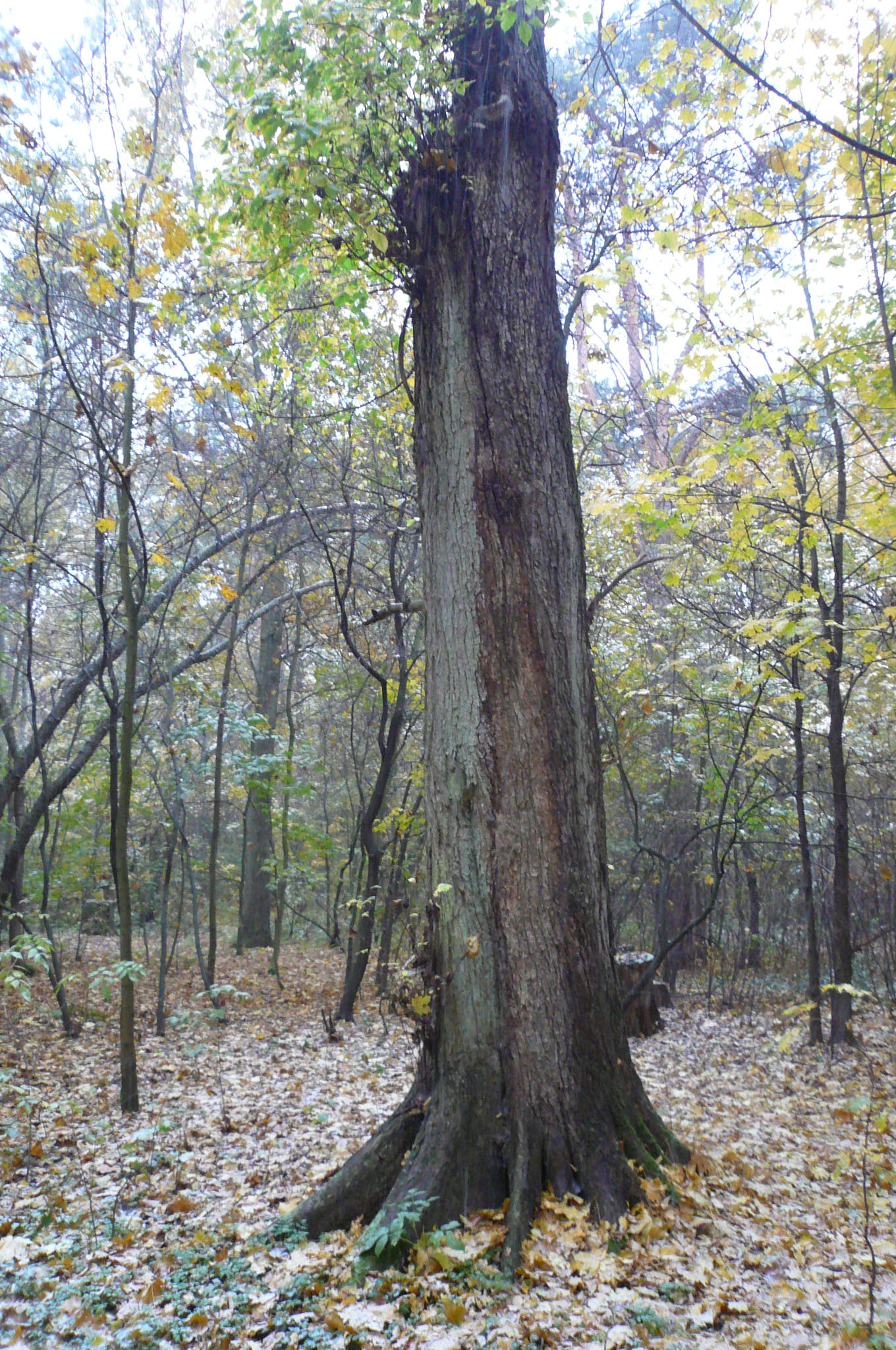 Okazały wiąz w starodrzewie w Lesie Bemowskim